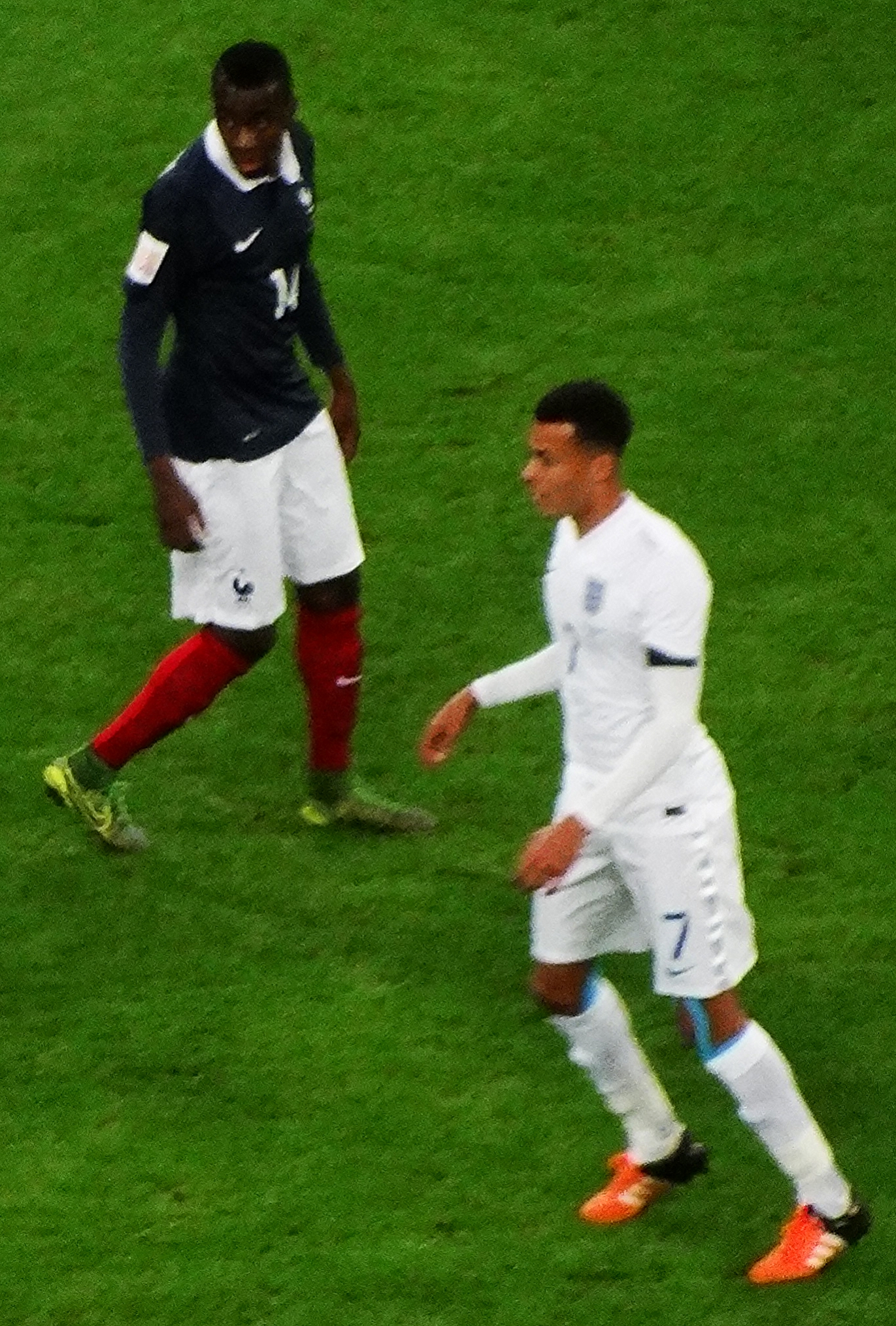 France midfielder Blaise Matuidi and England midfielder Dele Alli